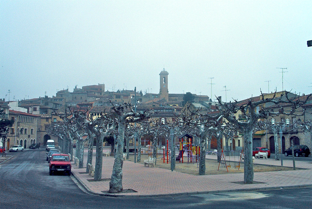 El Vilosell, plaça de Sant Sebastià amb Santa Maria i el Castell al fons